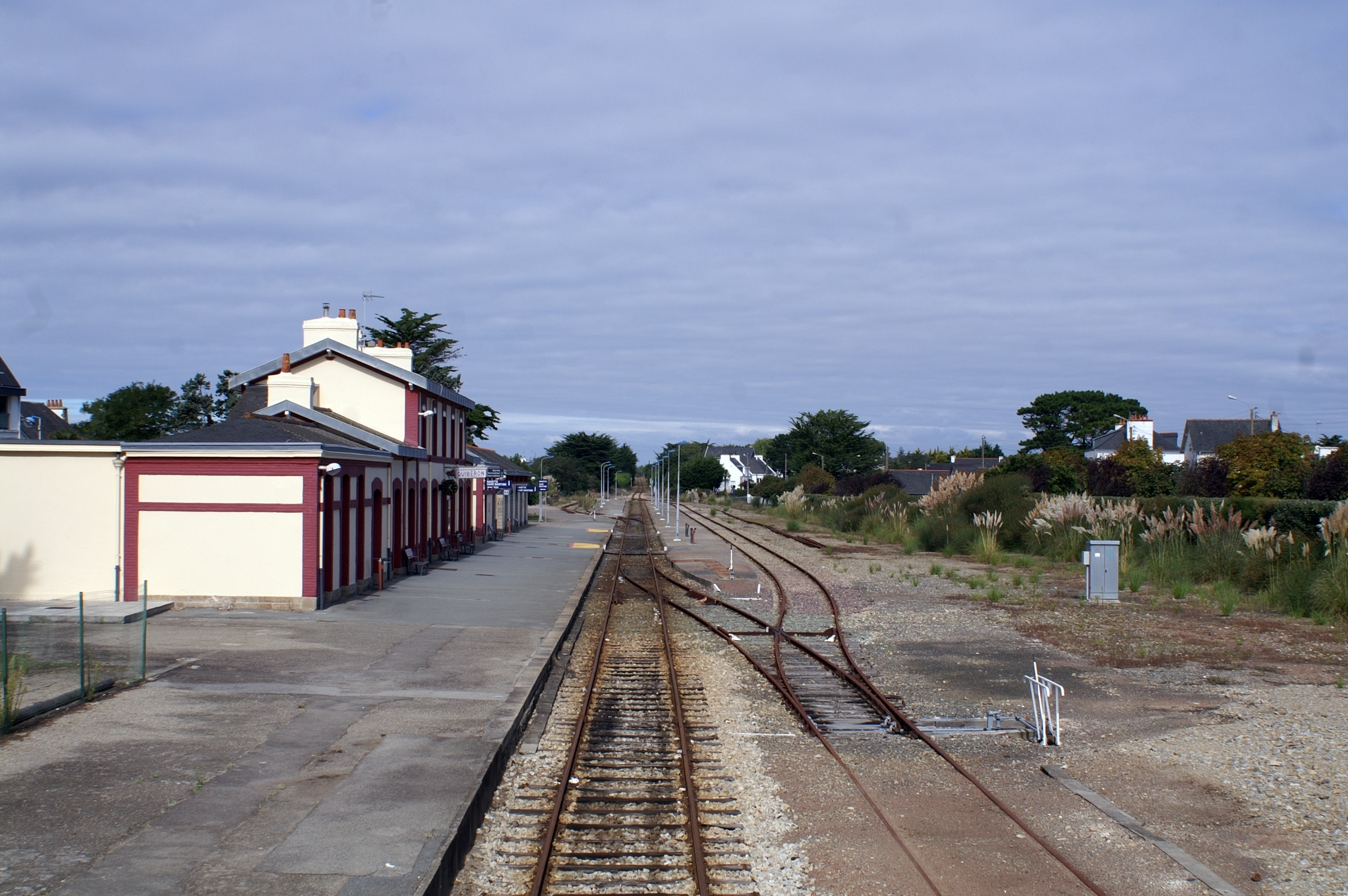 Vue d'ensemble de l'intérieur de la gare.